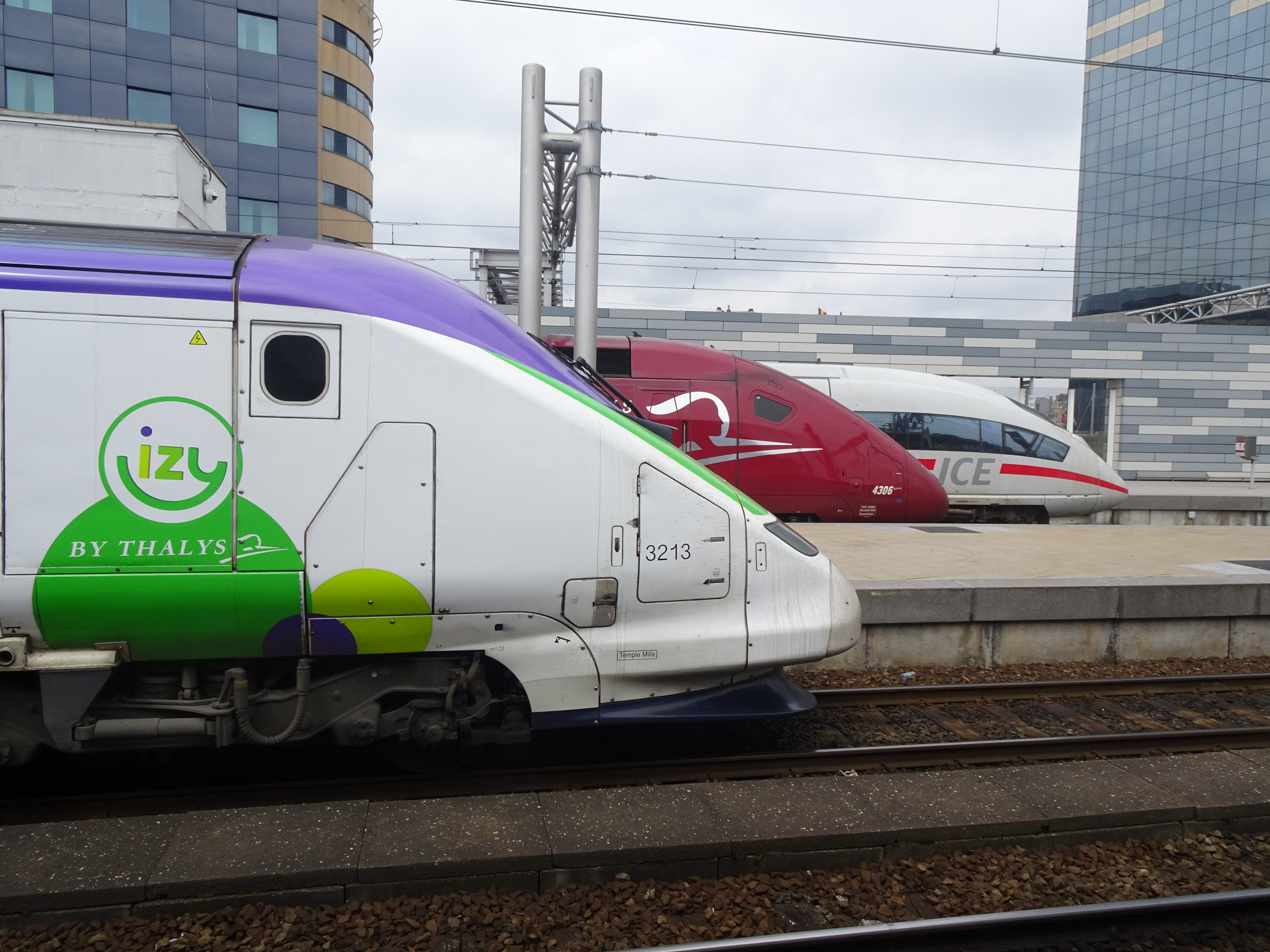 TGV TMST (ex-Eurostar) exploité par Izy, TGV PBKA de Thalys et ICE-3 série 406 non identifié attendant le départ côte à côte en gare de Bruxelles-Midi.